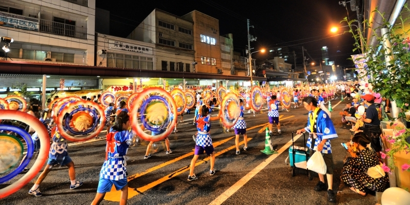 鳥取県鳥取市の鳥取しゃんしゃん祭(2013年)